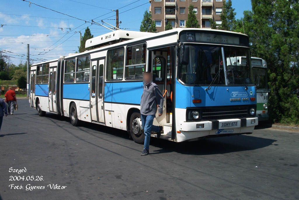 Ikarus 280 CNG busz Szegeden a 84-es vonalon